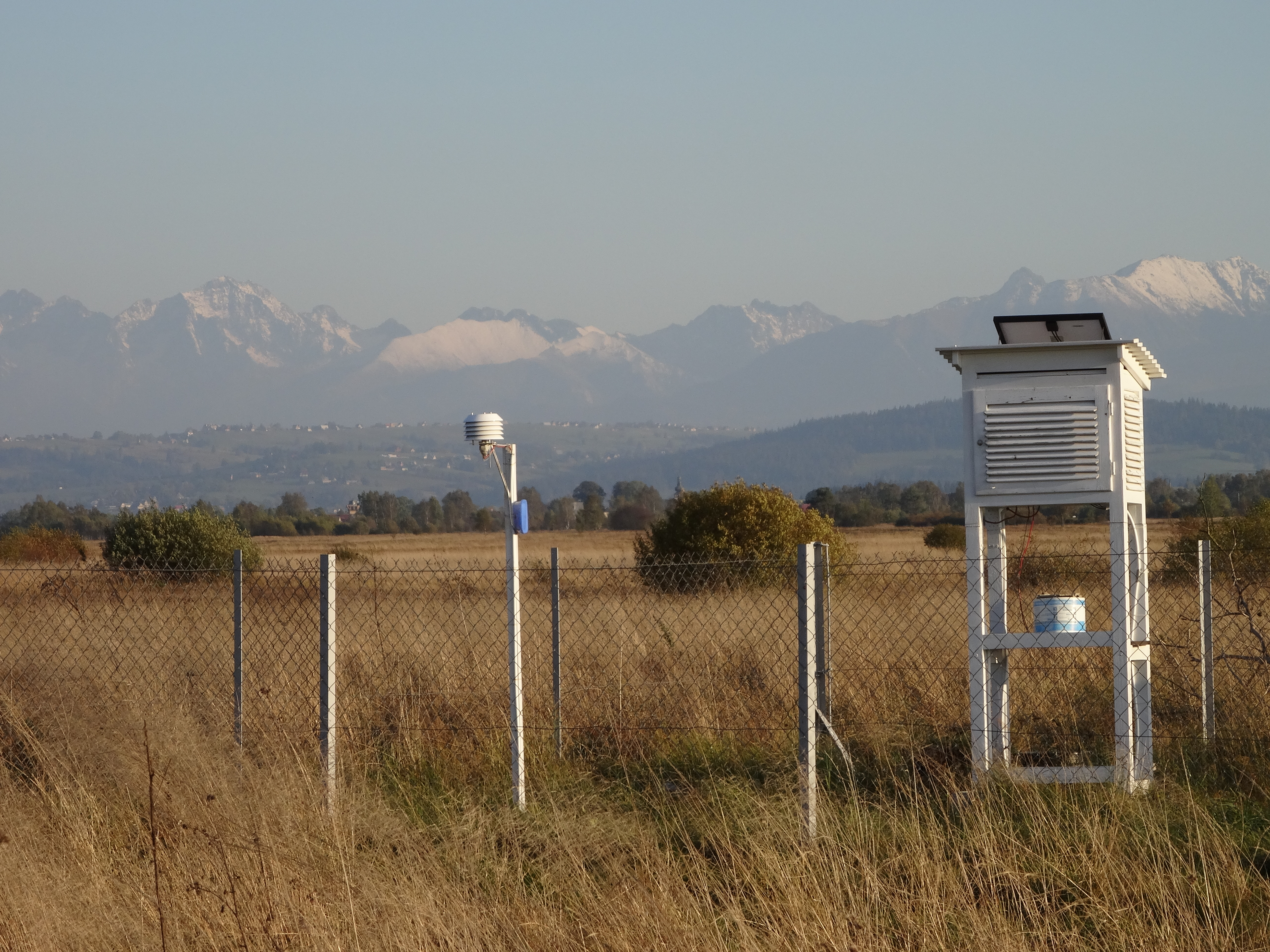 Prywatna stacja meteorologiczna na Puściźnie Rękowiańskiej na terenie administracyjnym Czarnego Dunajca